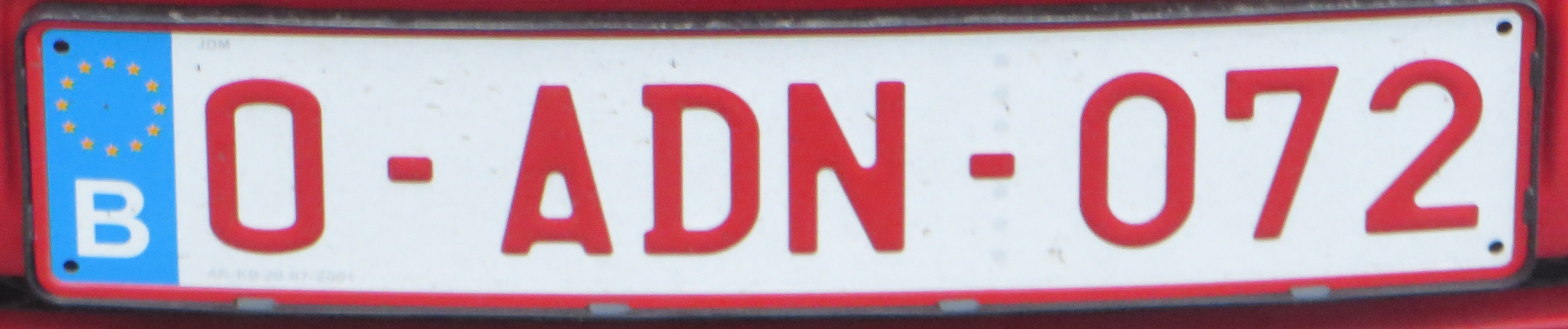 Oldtimer plaat België